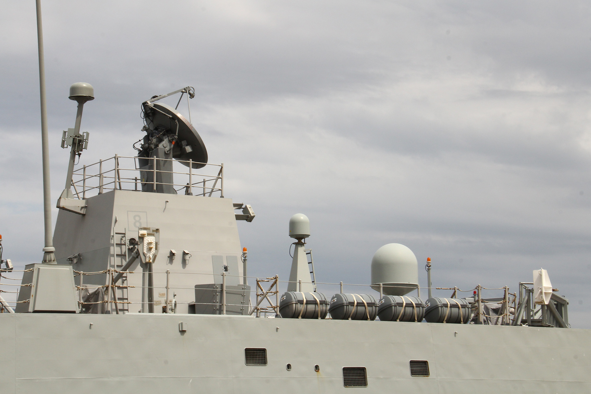 Visita a Vigo de las fragatas "Álvaro de Bazán" F-101 y "Almirante Juan de Borbón" F-102 de la Armada Española, ambas de la clase "Álvaro de Bazán" (también conocida como F-100), el 27 y 28 de mayo de 2017. Frigates F-100 in Vigo Visit to Vigo of the frigates "Álvaro de Bazán" F-101 and "Admirante Juan de Borbón" F-102 of the Spanish Navy, both of the class "Álvaro de Bazán" (also known as F-100), May 27 and 28, 2017.